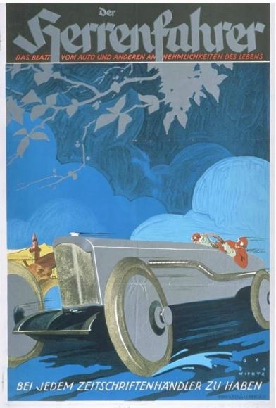 Der Herrenfahrer